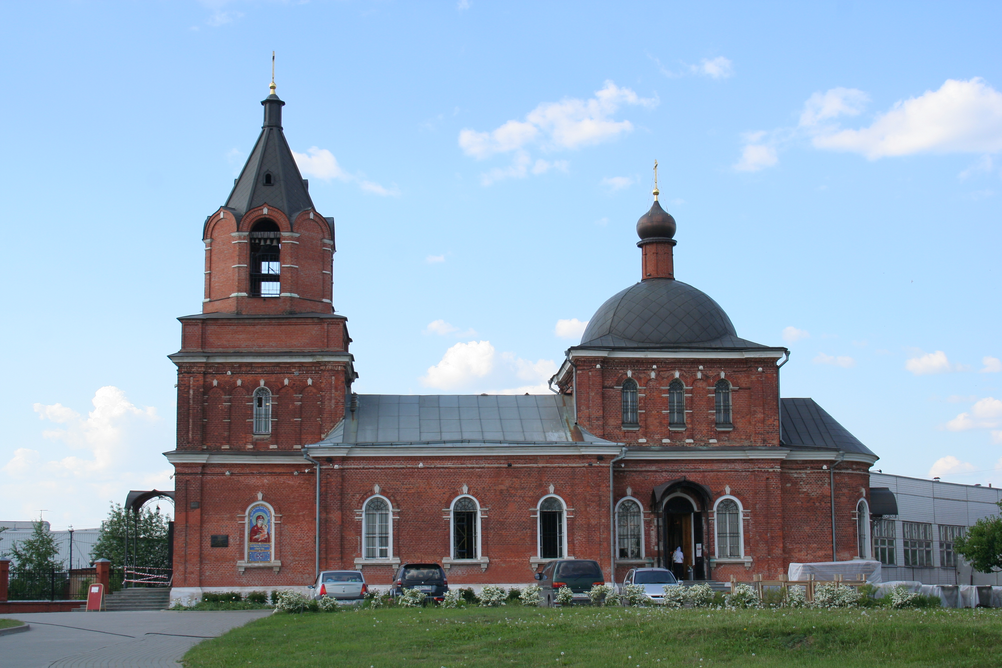 Kirche des Ehrwürdigen Sergius von Radonesch zu Bussinowo, Moskau.